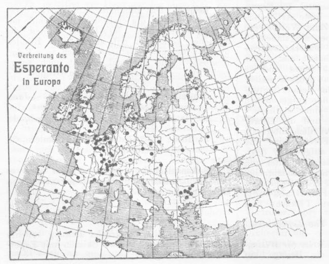 "Disvastiĝo de Esperanto". Mapo pri Esperanto-grupoj en Eŭropo, farita de la frankfurta grupo, en Germana Esperantisto, marto 1905Lietuvių: Europos žemėlapis, paskelbtas 1905 m. leidinyje „Germana Esperantisto“, su pažymėtomis vietomis, kuriose yra esperantininkų susivienijimai.